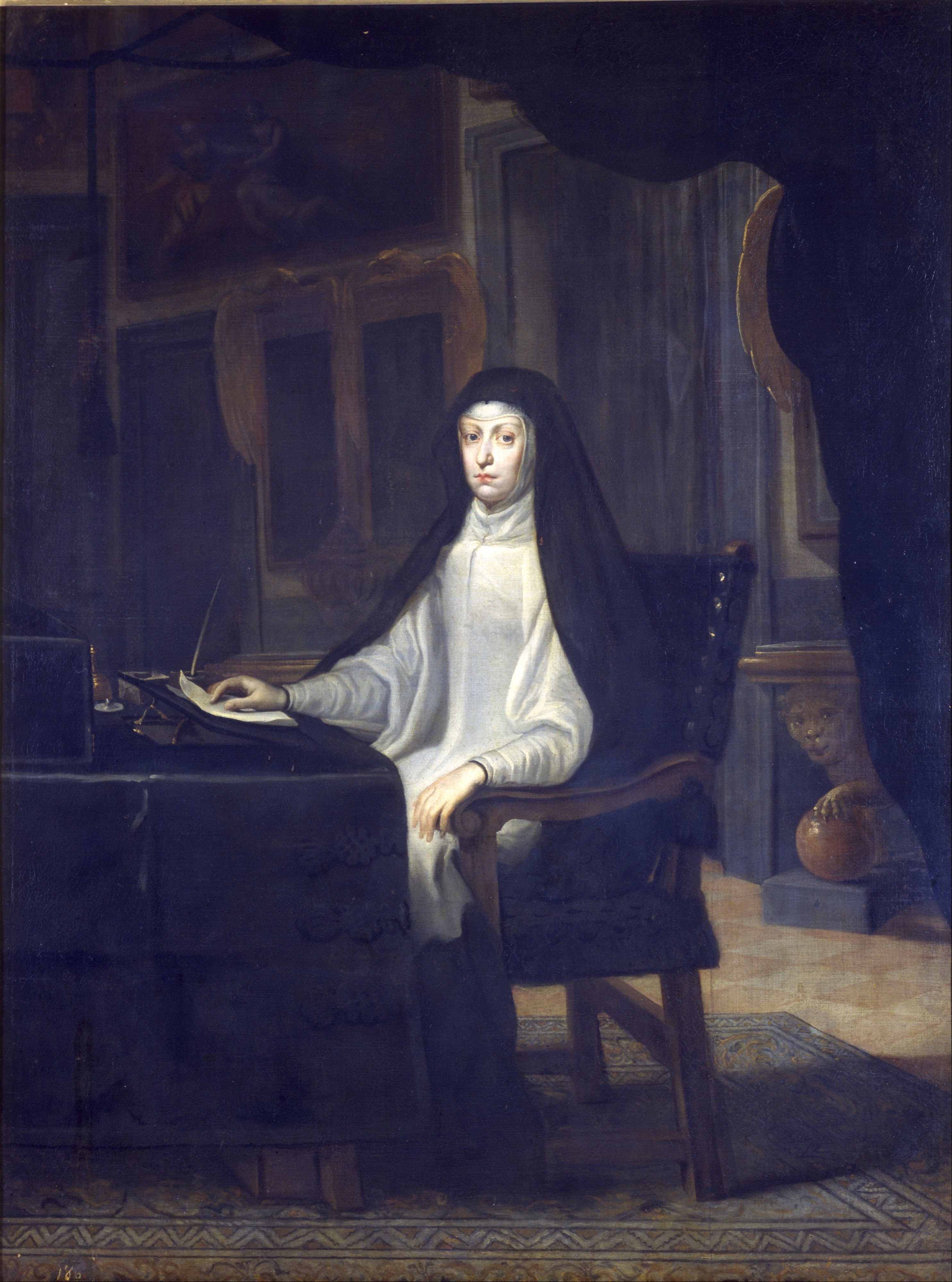 Retrato de la reina Mariana de Austria (1634-1696), que fue la segunda esposa del rey Felipe IV de España y la madre de Carlos II, durante cuya minoría de edad actuó como regente del reino.